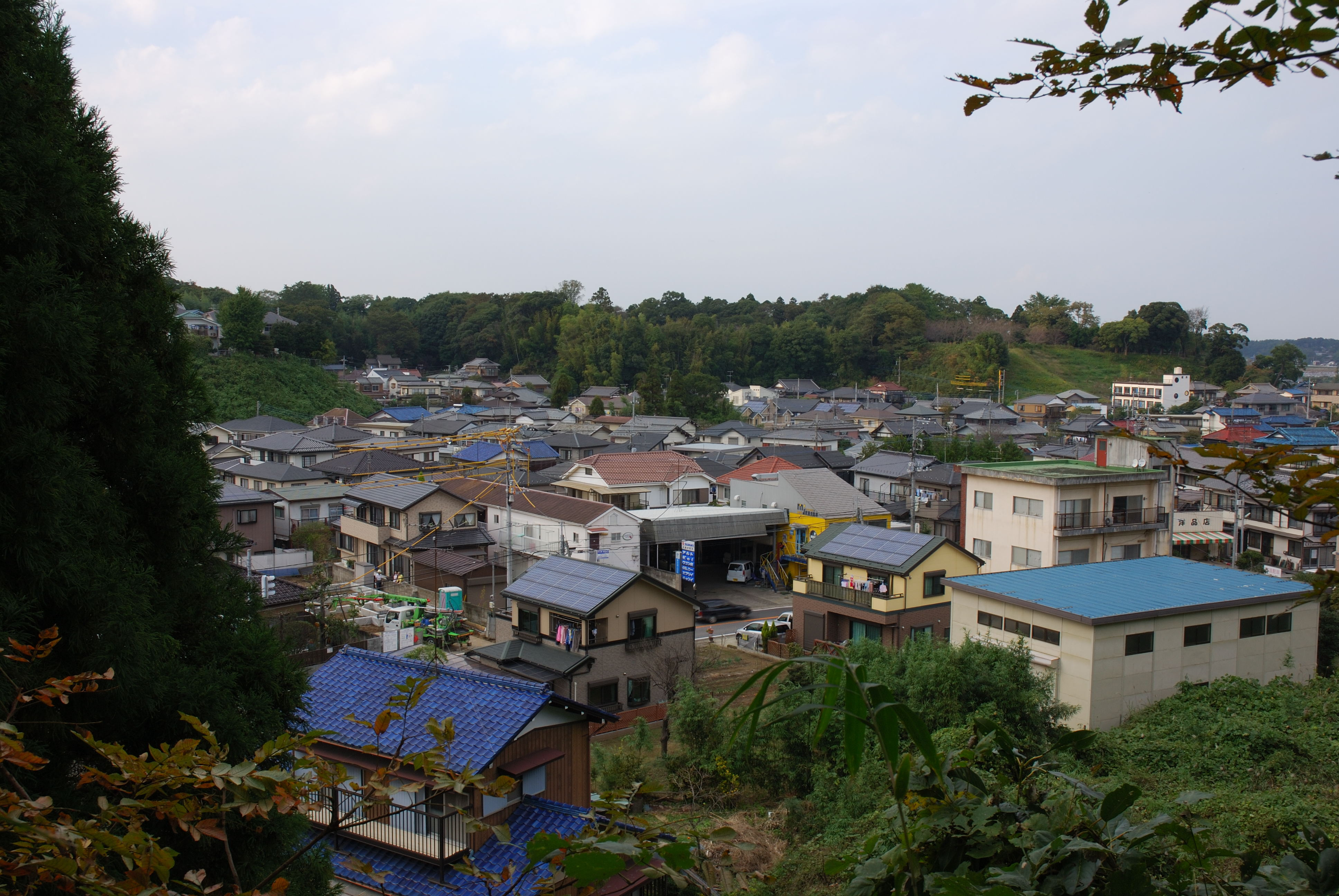 Usui Castle